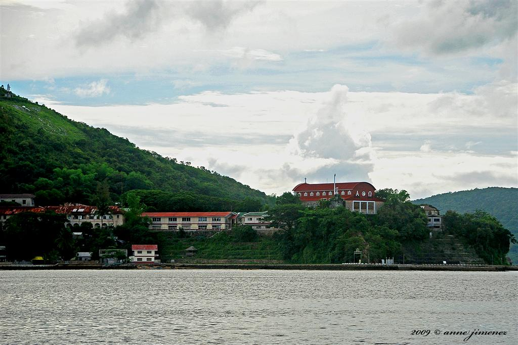 Culion, Calamian islands (Palawan)